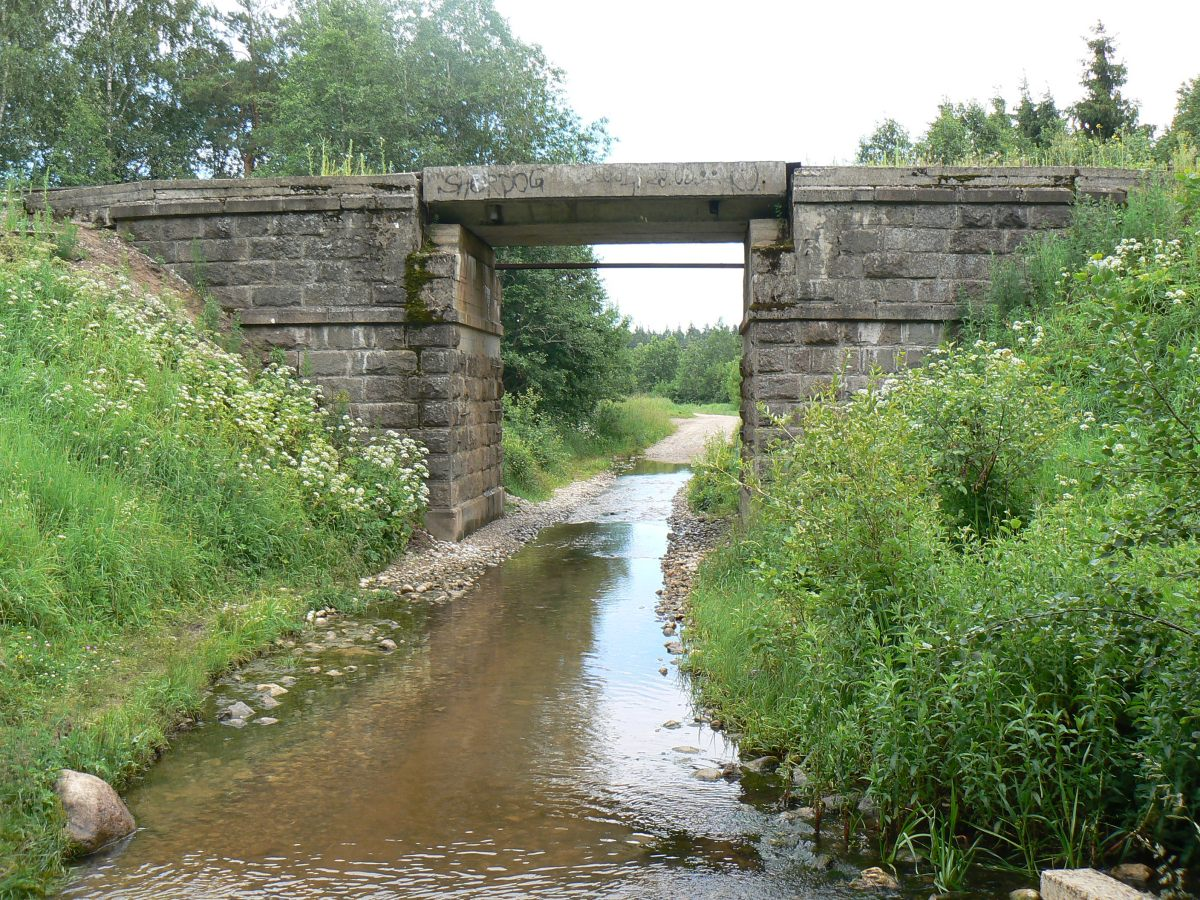 Pulga oja raudteesild